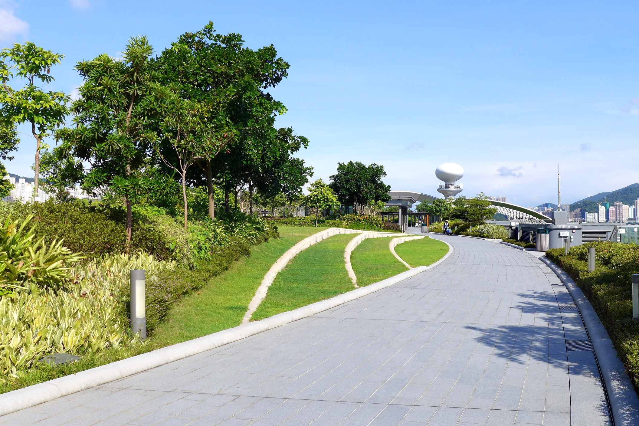 The Kai Tak Cruise Terminal Park